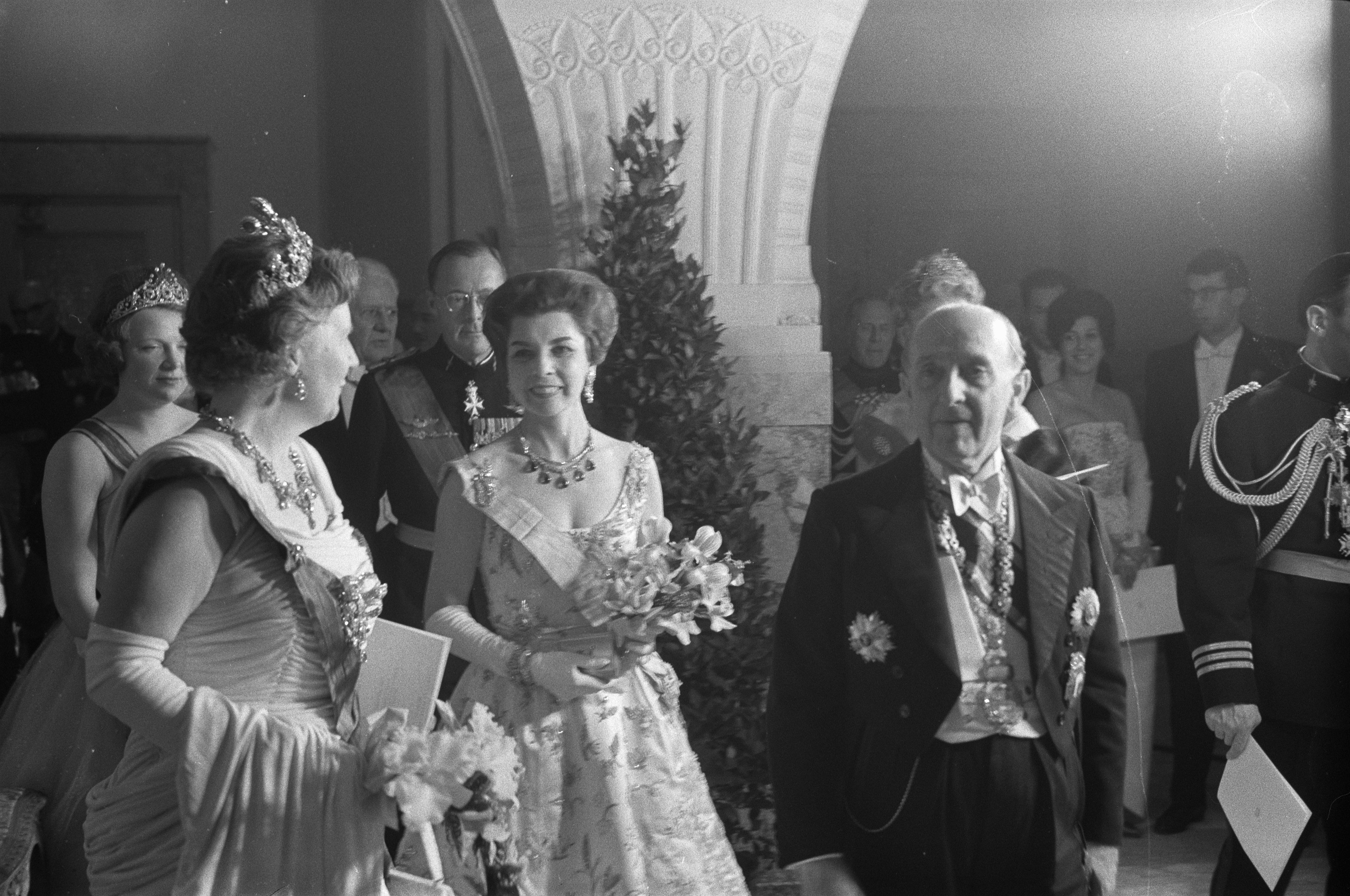 Collectie / Archief : Fotocollectie Anefo Reportage / Serie : [ onbekend ] Beschrijving : Bezoek aan het Koninklijk Schouwburg in Den Haag , de gasten in de hal van de Schouwburg Datum : 7 maart 1960 Locatie : Den Haag, Zuid-Holland Trefwoorden : GASTEN, bezoeken, schouwburgen Instellingsnaam : Koninklijke Schouwburg Fotograaf : Pot, Harry / Anefo Auteursrechthebbende : Nationaal Archief Materiaalsoort : Negatief (zwart/wit) Nummer archiefinventaris : bekijk toegang 2.24.01.05 Bestanddeelnummer : 911-0743